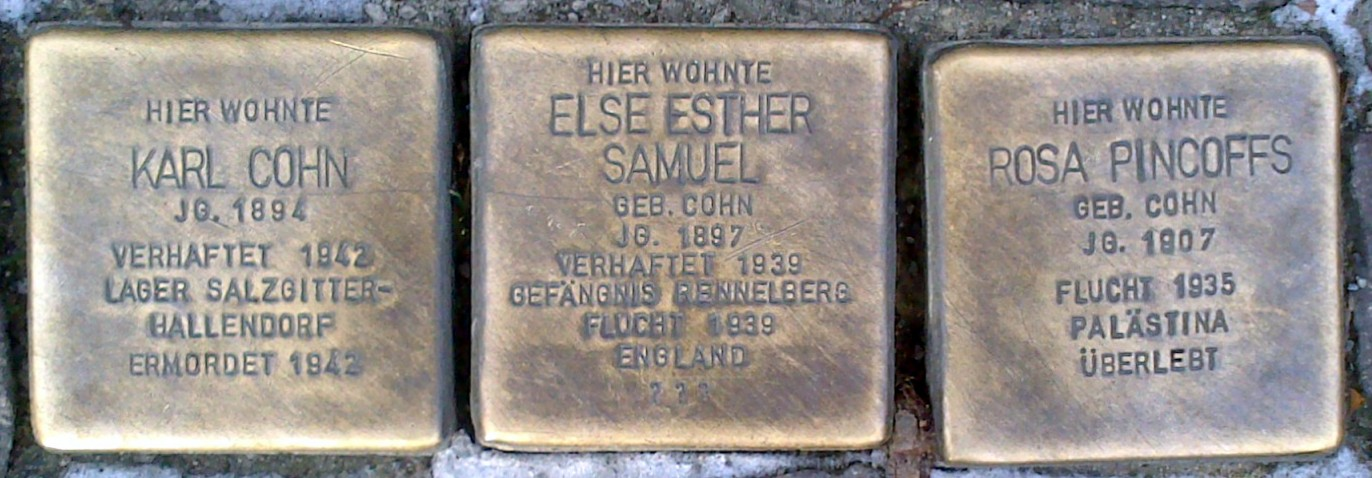 Braunschweig: Stolpersteine für drei Mitglieder der Familie Cohn vor dem ehemaligen Judenhaus Höhe 3, in dem sie zuletzt leben mussten.